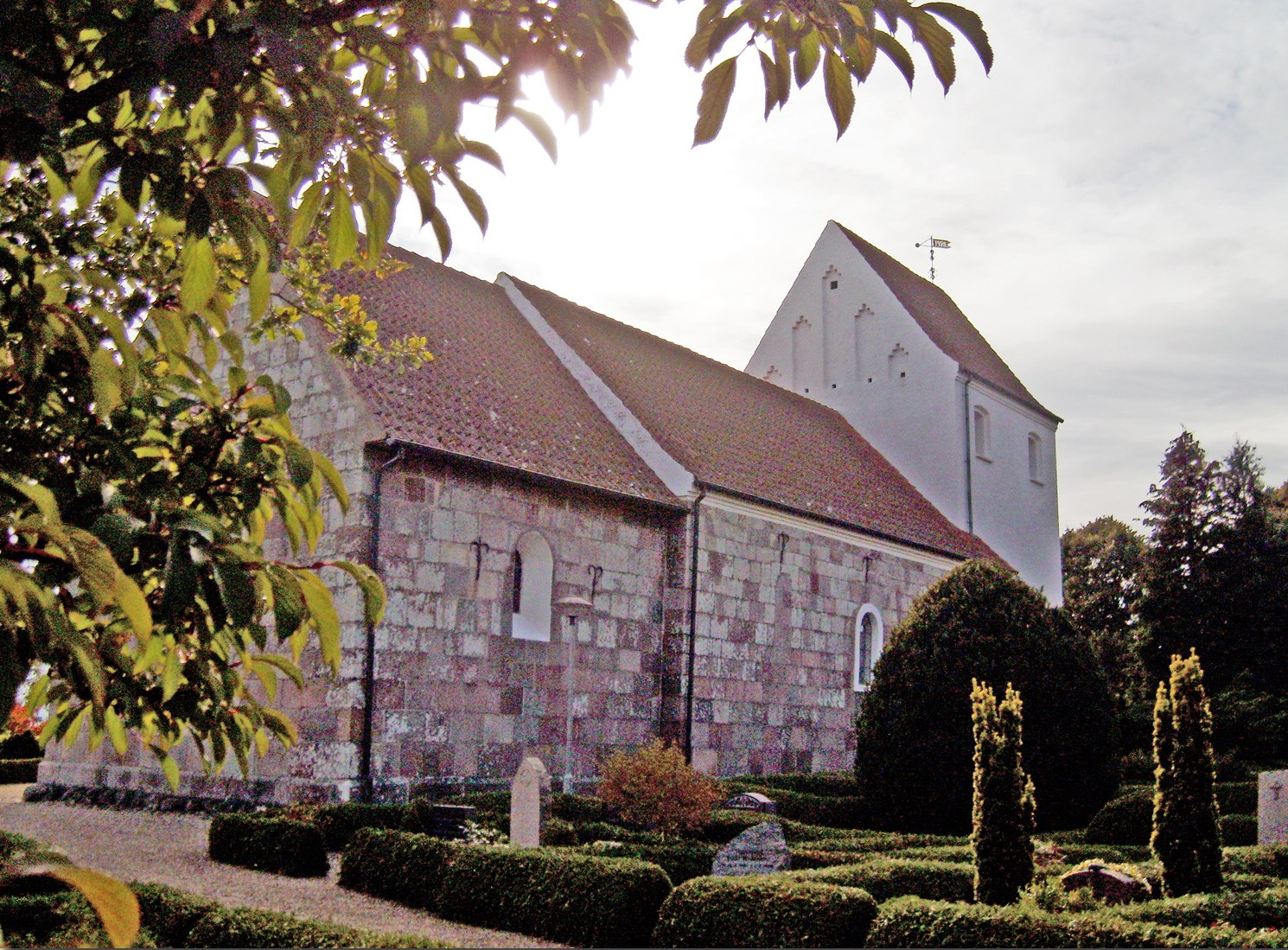 fra nordøst